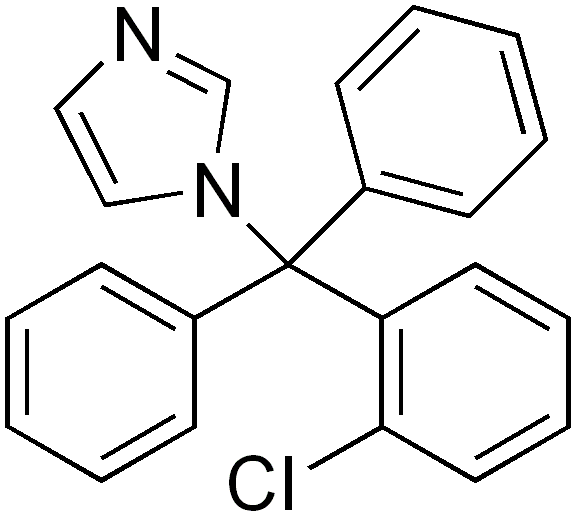 chemical structure of clotrimazole